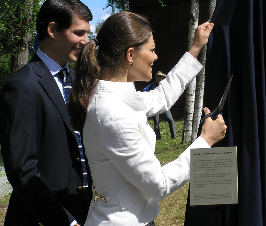 Kronprinsessan Victoria besöker Skultuna Messingsbruk 2007